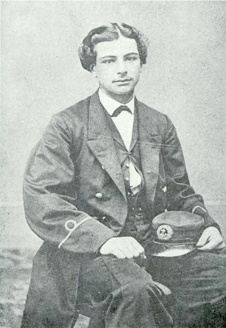 Arturo Prat a la edad de 16 años, como guardiamarina